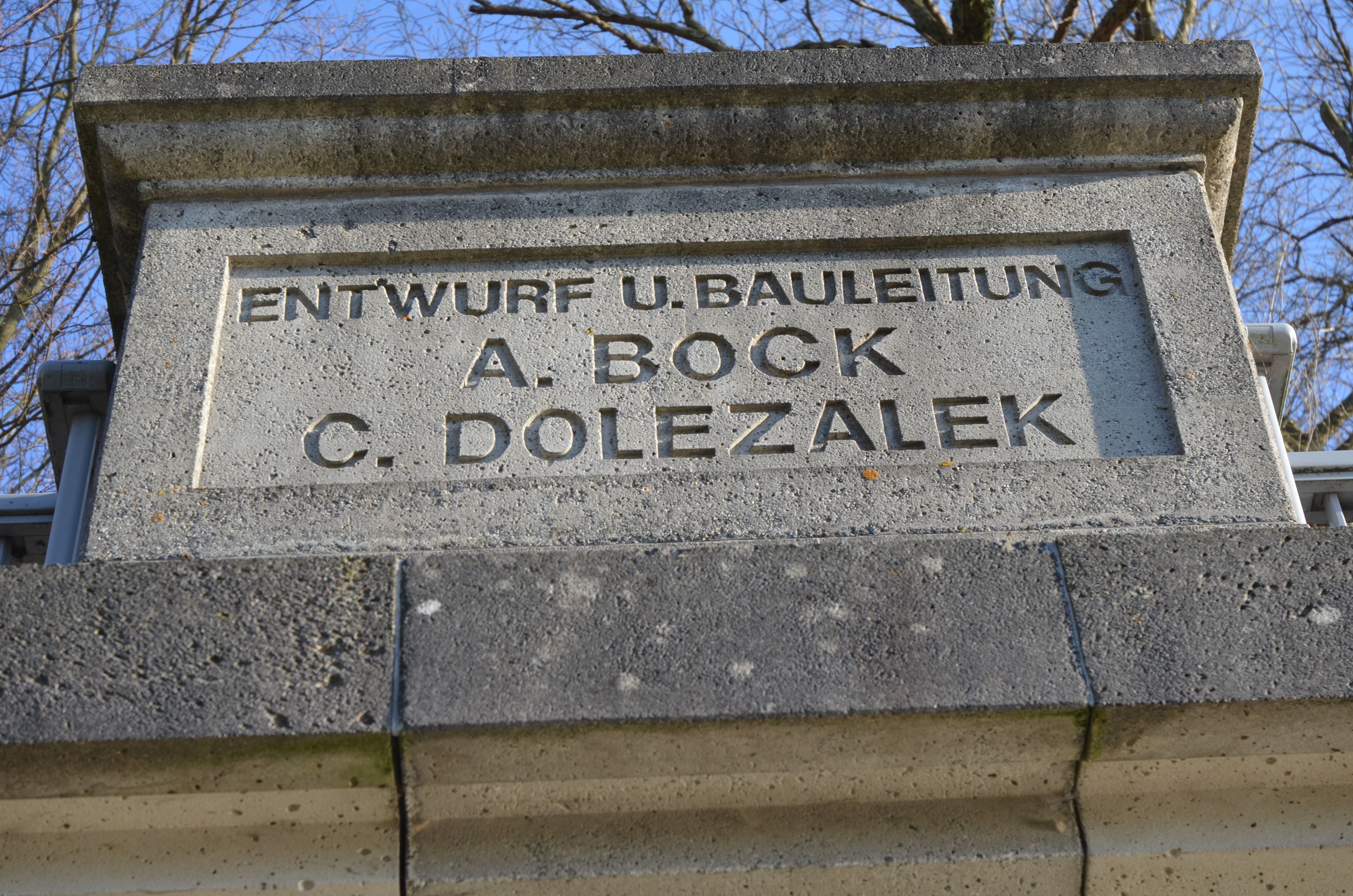 Die in den Jahren 1899 bis 1900 erbaute Dreibogenbrücke in Grasdorf, Laatzen, Region Hannover entstand nach Entwürfen und unter Bauleitung des Direktors der Städtischen Kanalisation- und Wasserwerke der Stadt Hannover, Anselm Bock in Zusammenarbeit mit dem ebenfalls für die städtische Einrichtung tätigen Ingenieur Carl Dolezalek. Diese erste erste flach gespannte Betonbrücke über die Leine fand international Beachtung und steht heute unter Denkmalschutz ...